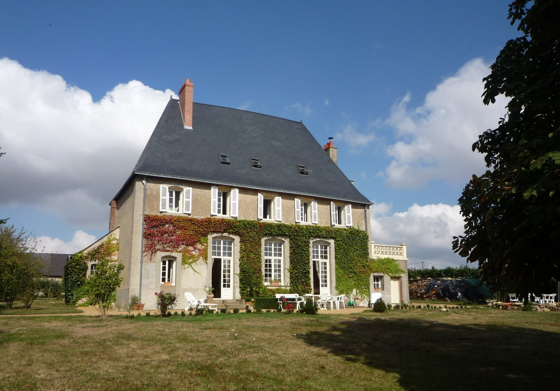 Ancien Prieuré des Anges (Anjou)